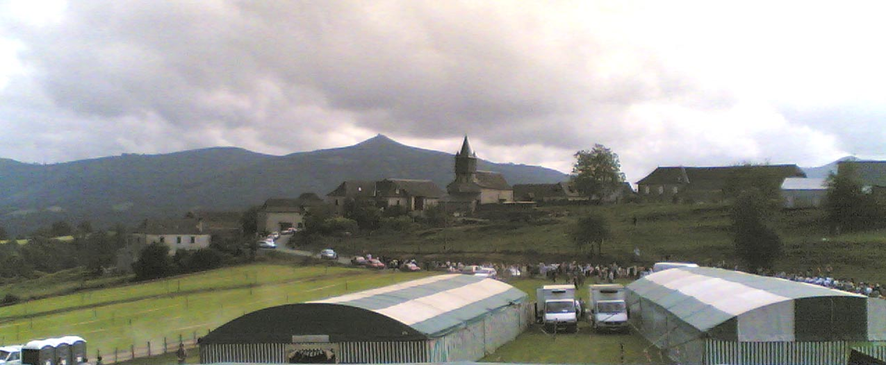 Vue de Cihigue depuis le site de la pastorale